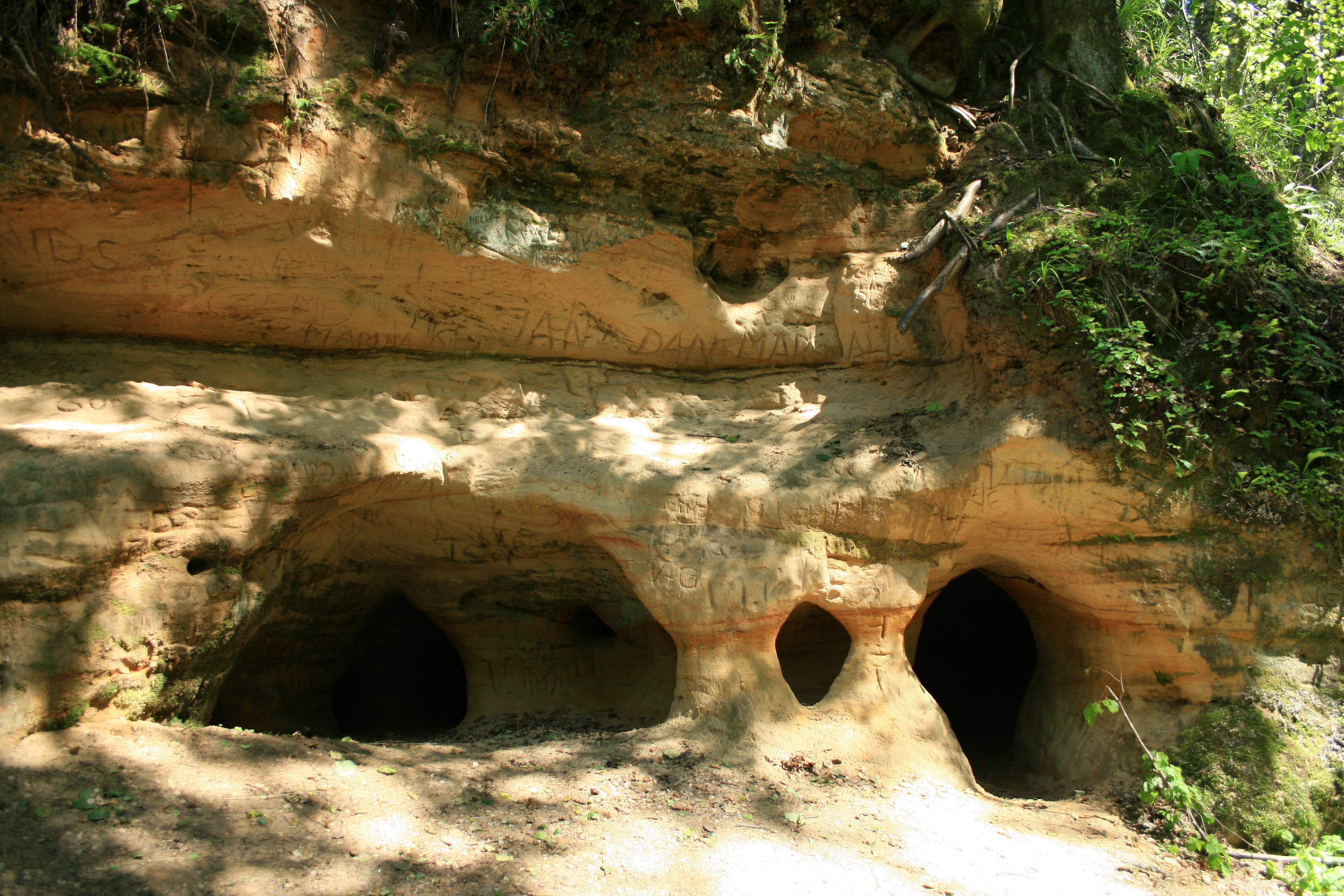 Liepniekvalks cave